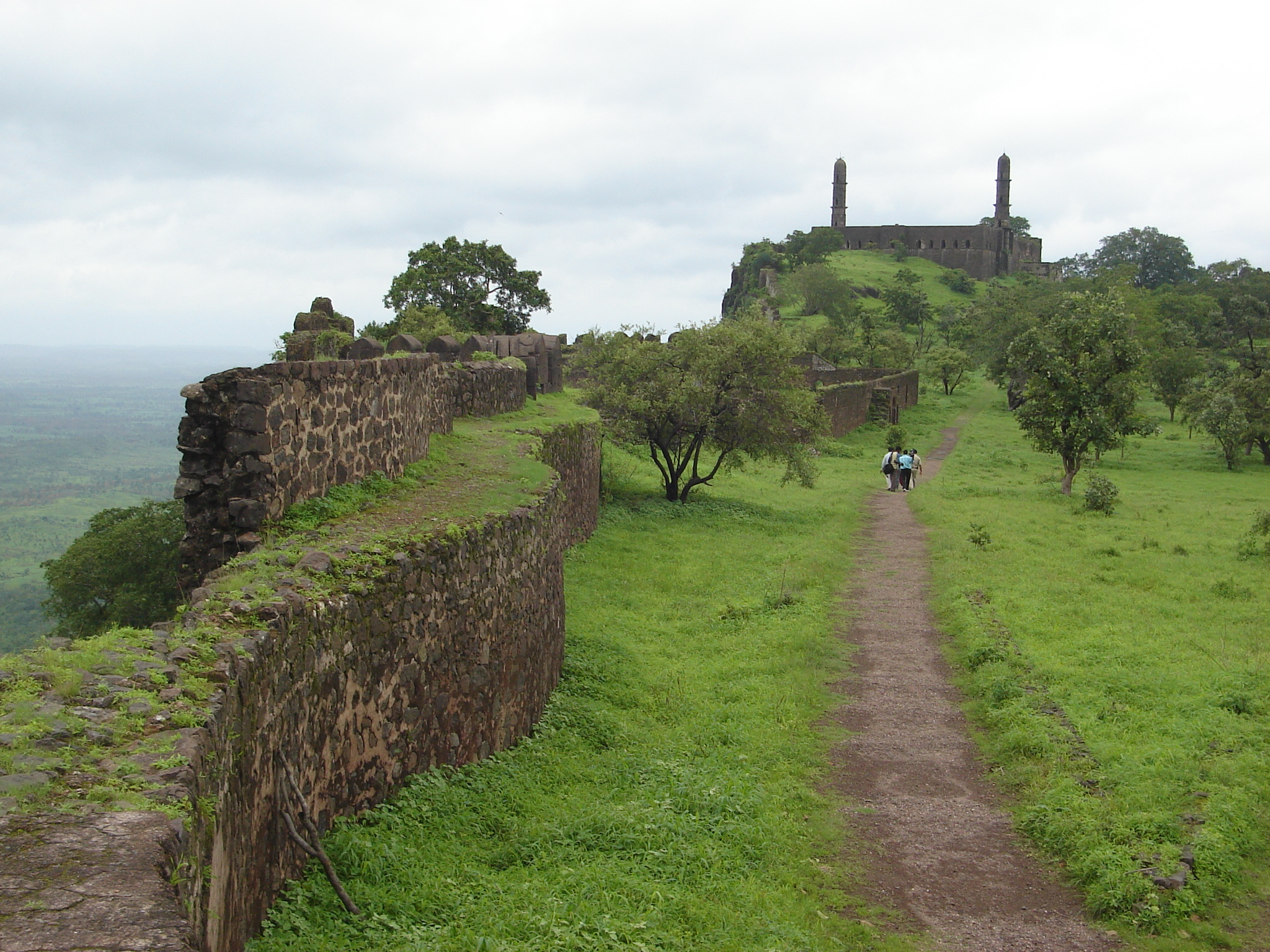 Asirgarh Fort near Burhanpur in Madhya Pradesh, India